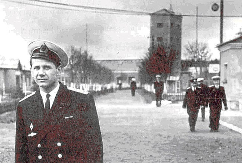 На переднем плане командир отличной группы Приёмного Центра капитан-лейтенант О.М.Кусенко. В глубине снимка: слева – барак, где размещался штаб Отряда и Информационный Центр; в средней части снимка на дальнем плане – первое техническое здание Приёмного Центра; справа – здание клуба. Купавна. 1960 год.